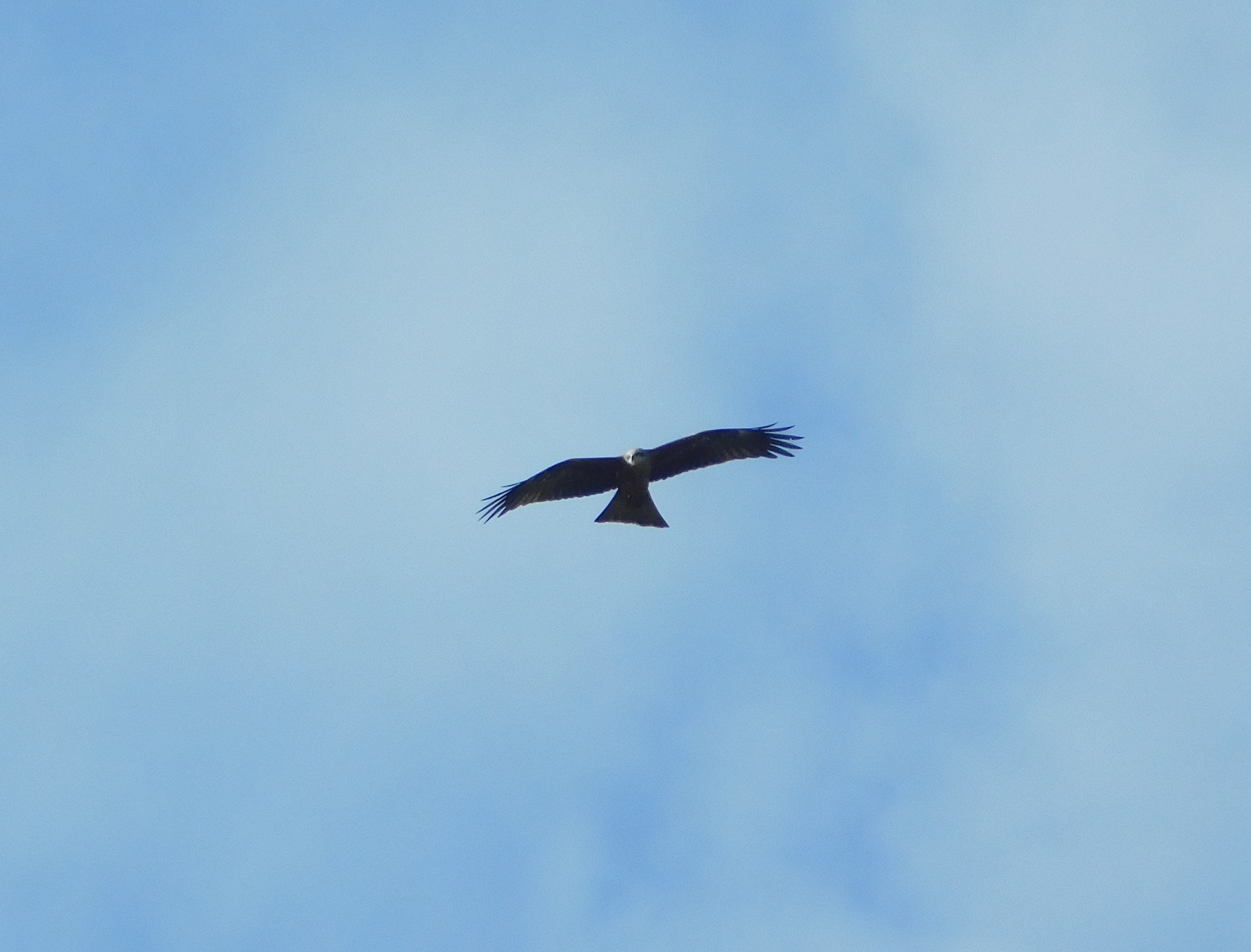 Srpski (latinica): Crna lunja (Milvus migrans) je vrsta ptice grabljivice koja se gnezdi u nizijskim vodoplavnim šumama Srbije, uglavnom uz Dunav, Savu i Tisu. Selica je i u zimskom periodu još uvek nije beležena u našoj zemlji. Trouglast rep koji je plitko usečen i dugačka krila su jedne od glavnih karakteristika.